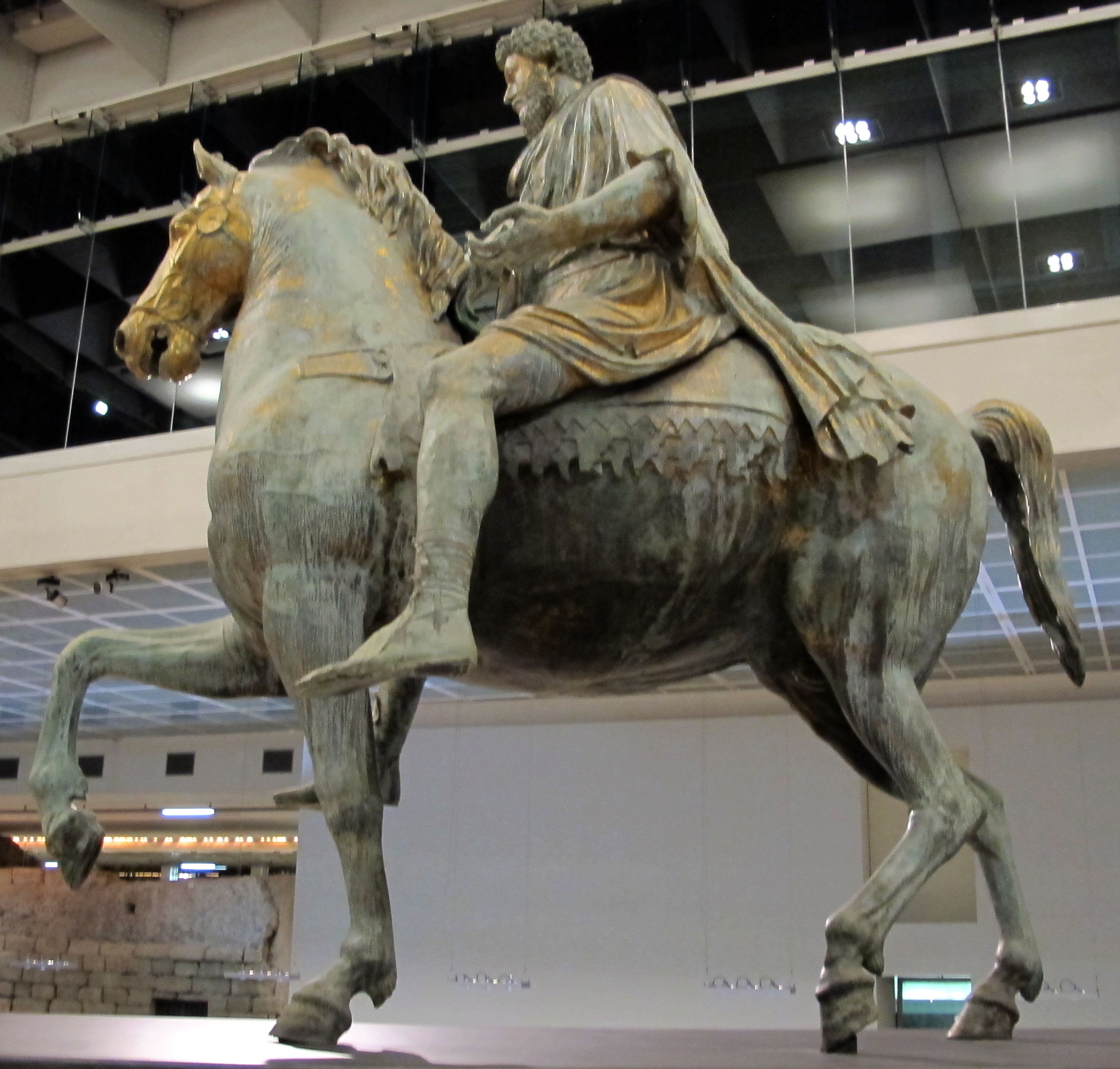 Musei Capitolini